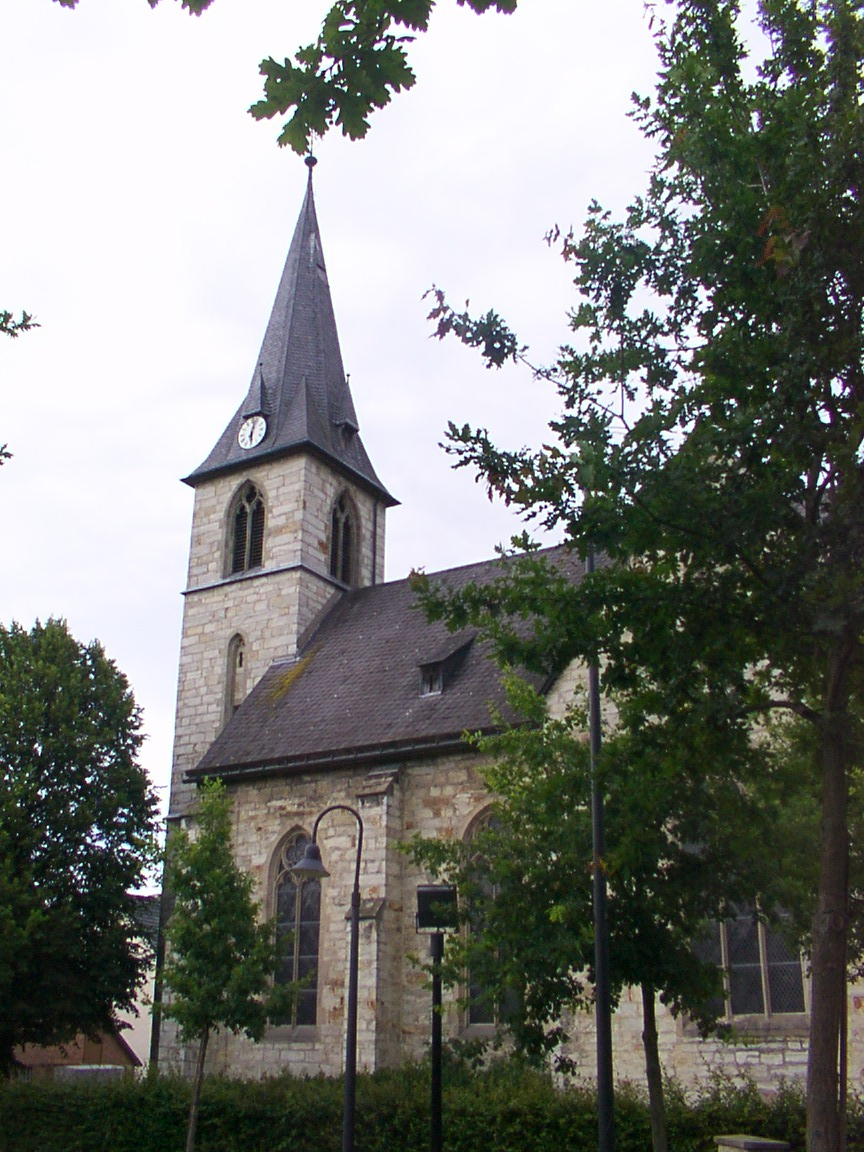 Lichtenau (Westfalen): katholische Kirchein Henglarn